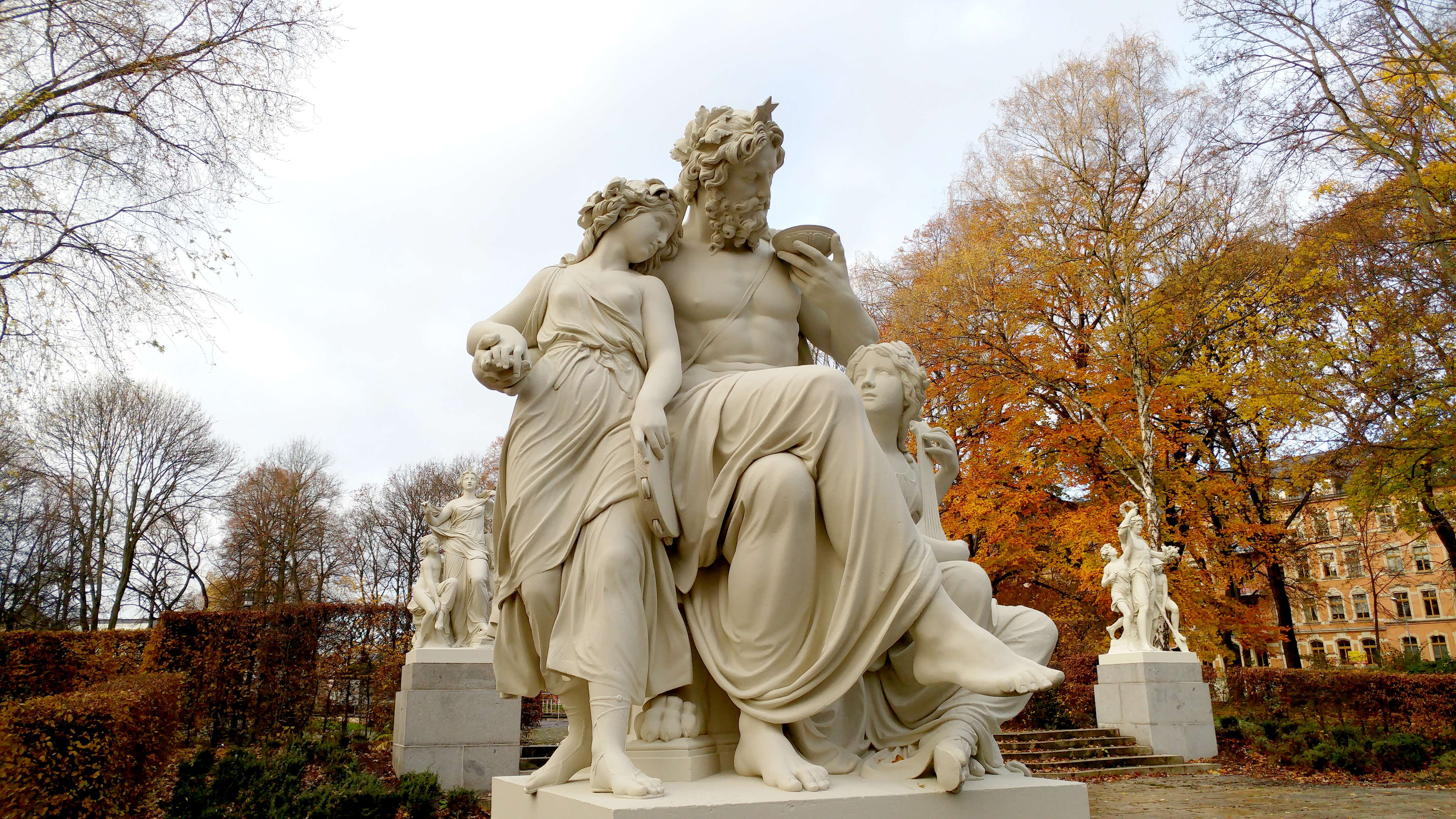 Der Abend